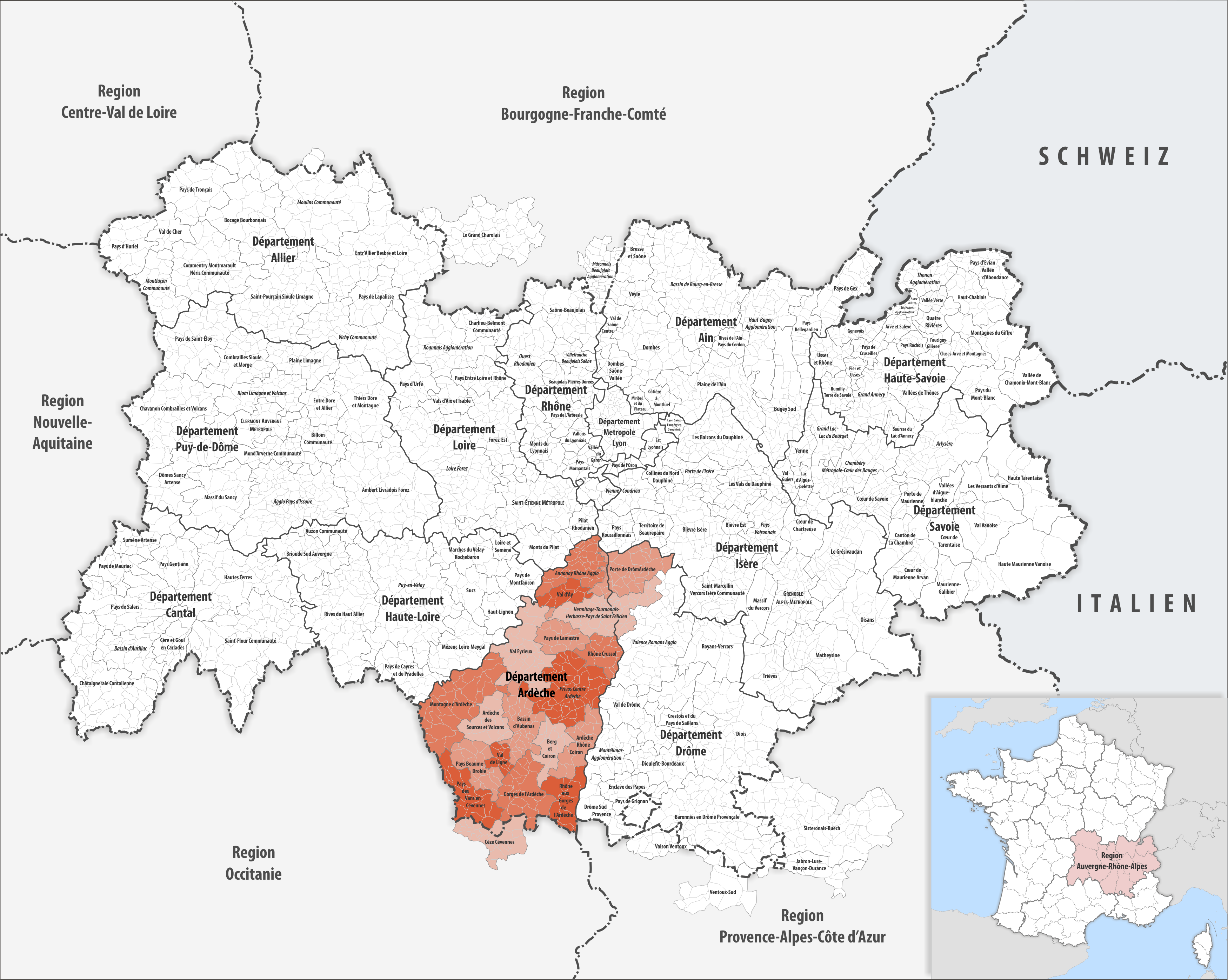 Gemeindeverbände im Département Ardèche